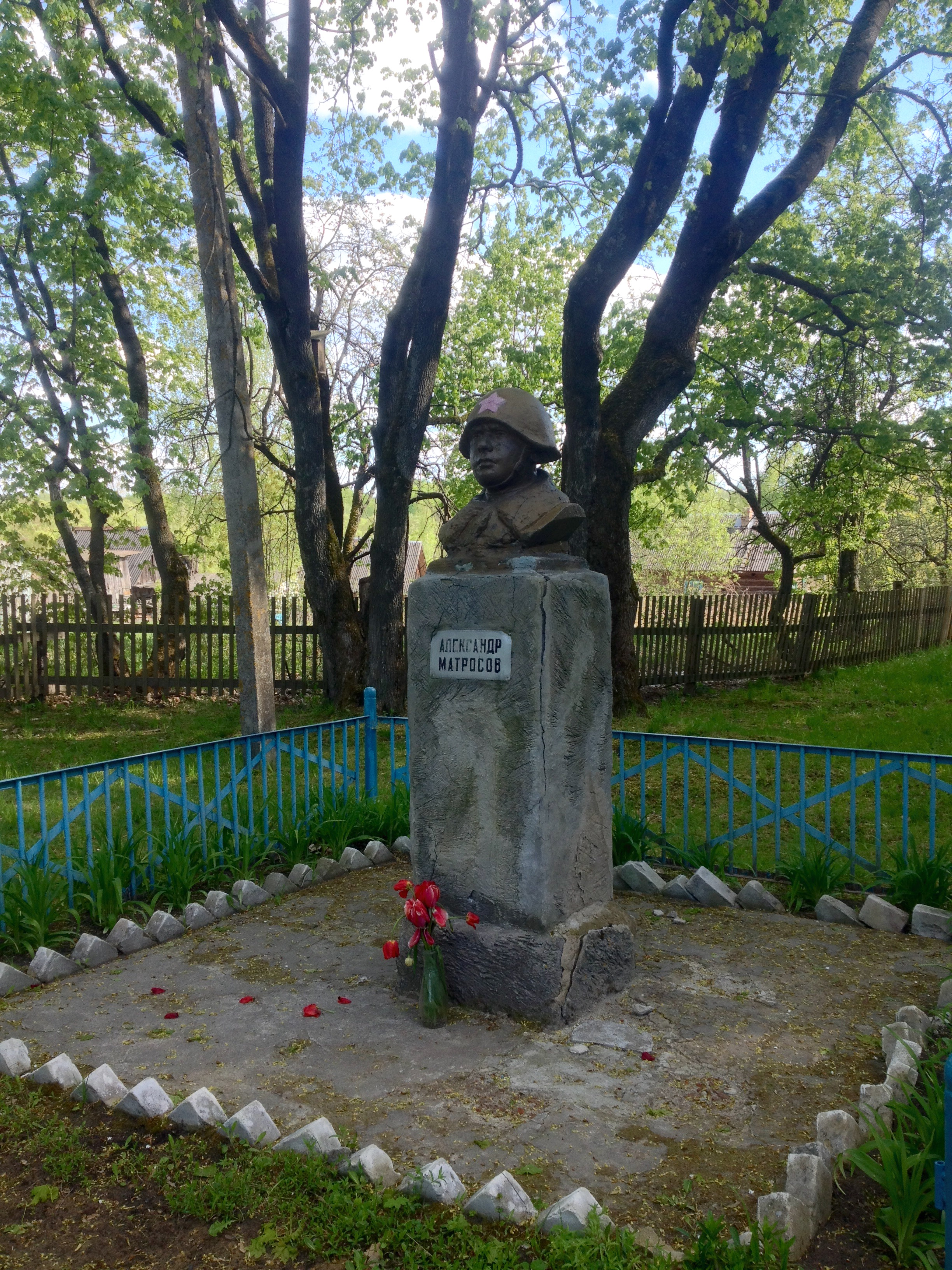 (май 2017)